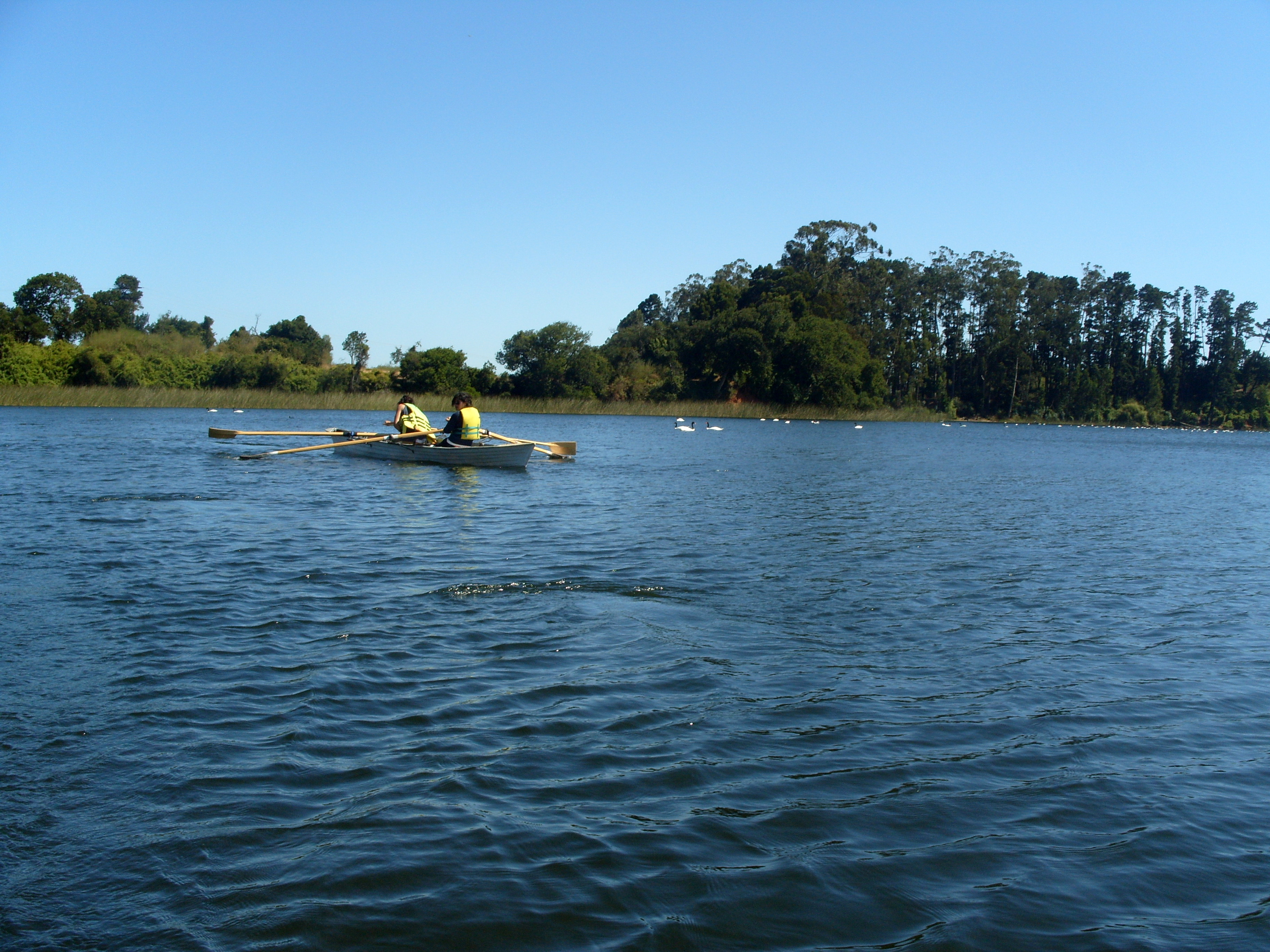 Navegando en bote en la "Laguna Grande" de San Pedro de la Paz VIII Región del Biobío, Chile Febrero de 2009